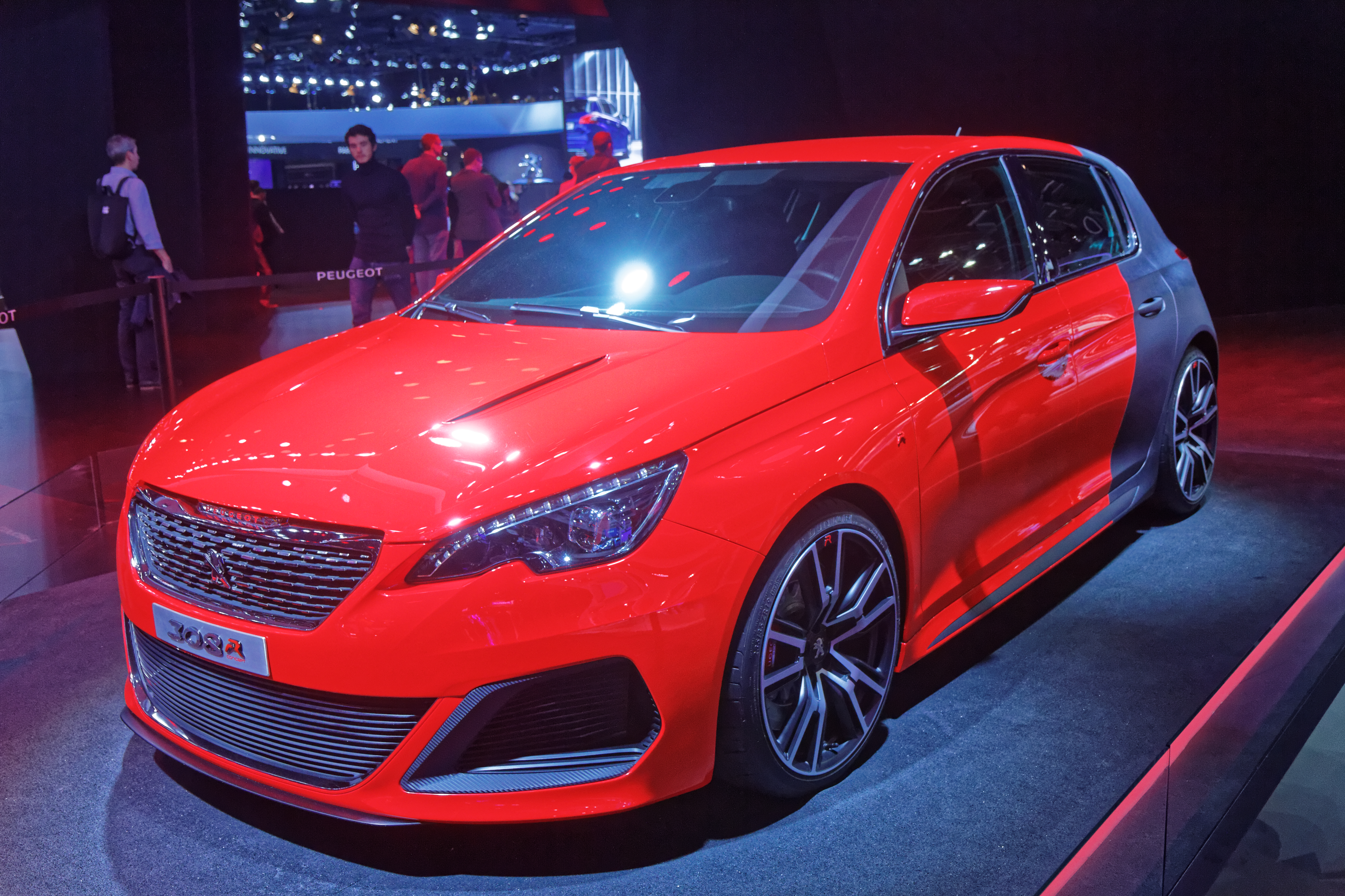 Une Peugeot 308 R présentée lors du mondial de l'automobile de Paris 2014.